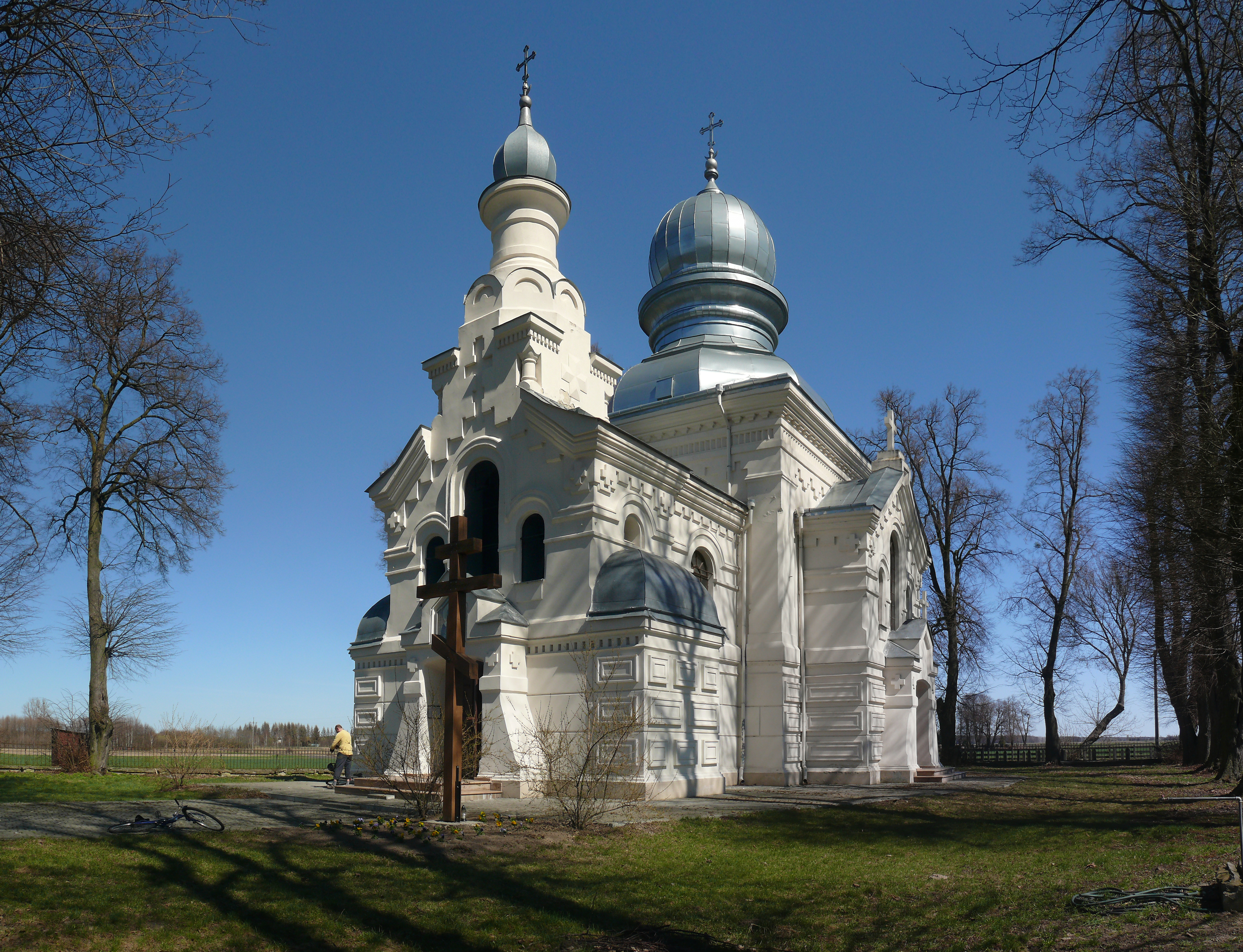 Cerkiew p.w. Św. Mikołaja Cudotwórcy w Dratowie, woj. lubelskie.